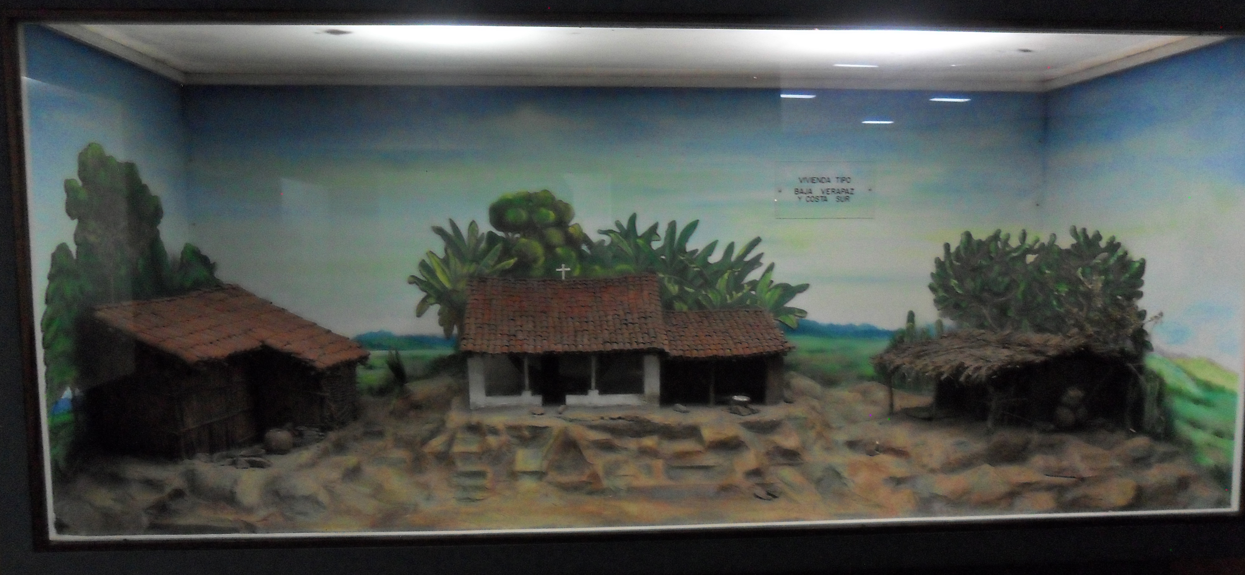 Maqueta Vivienda Tipo en Baja Verapaz y Costa Sur Guatemala del Museo Nacional de Arqueologia y etnologia de Guatemala